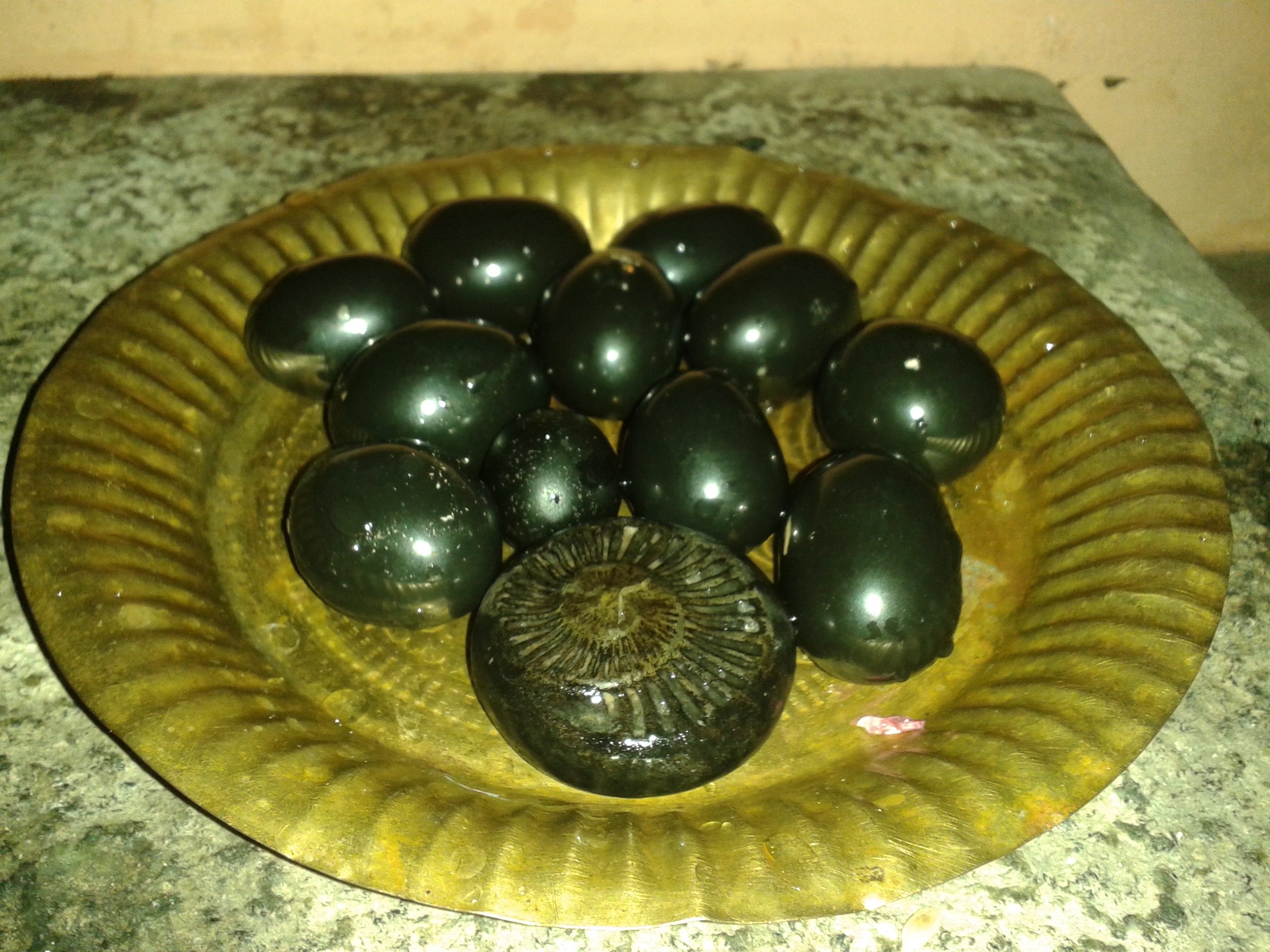 സാളഗ്രാമം